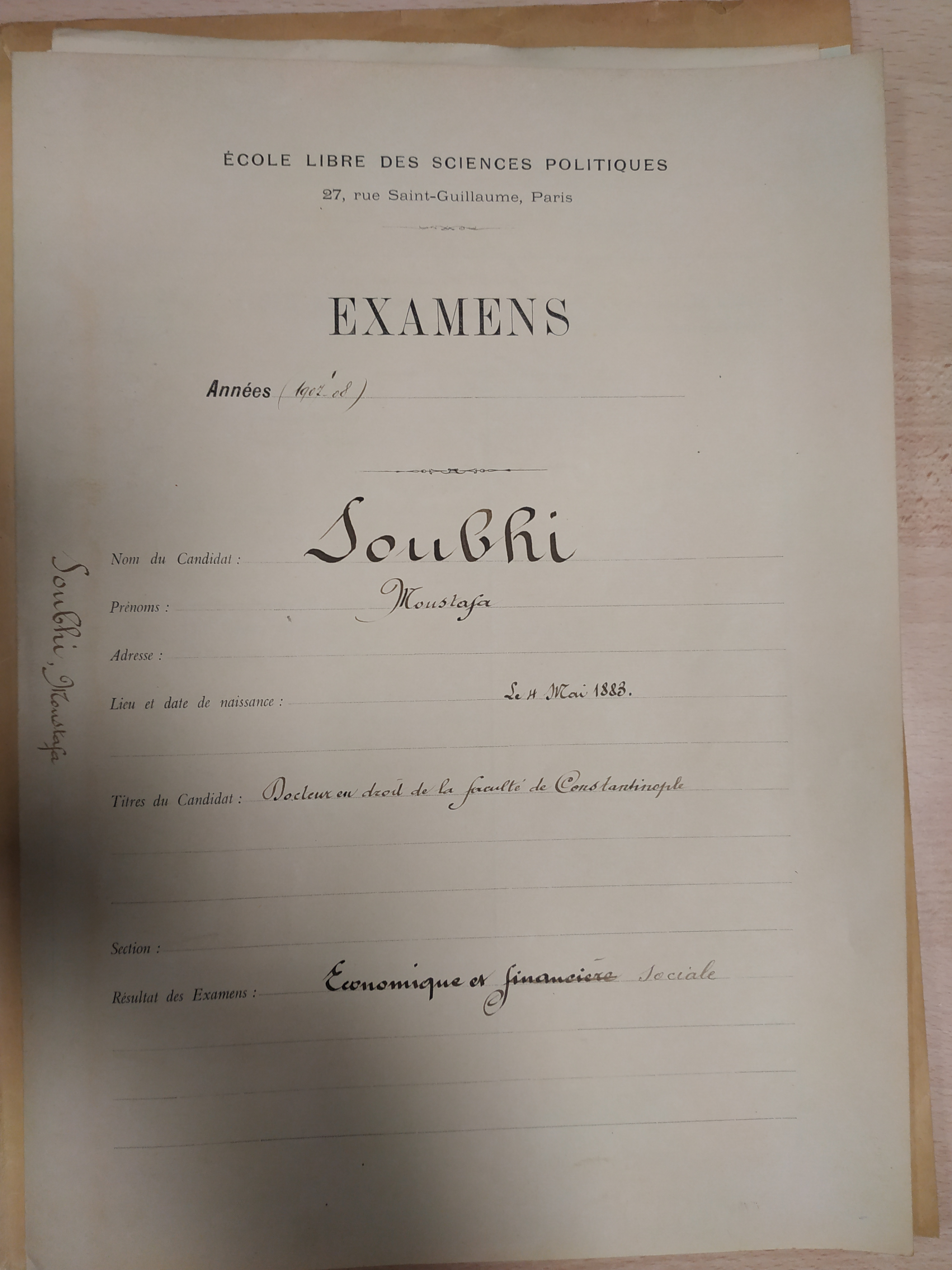 Mustafa Suphi'nin Paris'te eğitim gördüğü kurumdaki öğrenci belgesi.